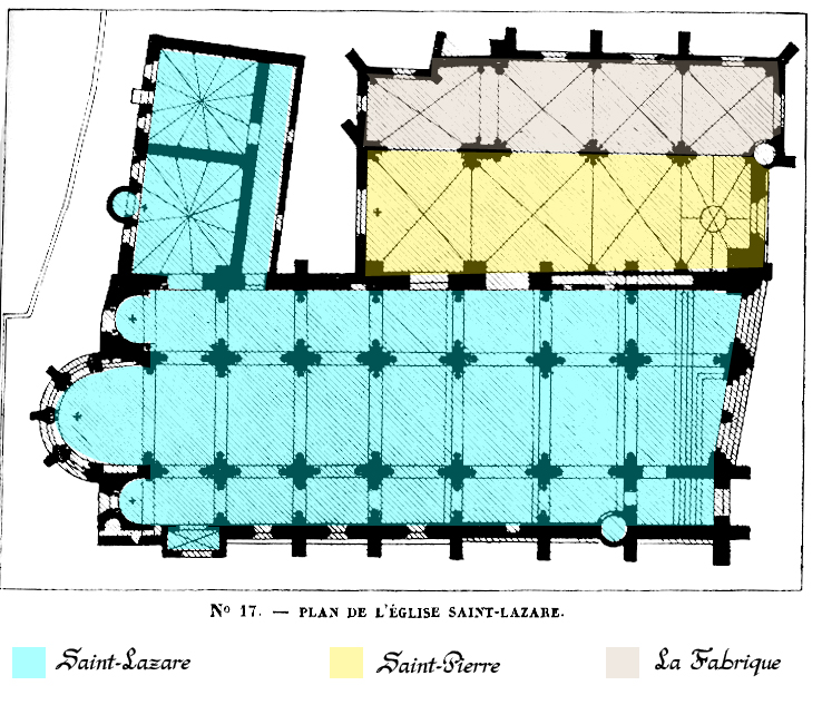 Plan de l'église Saint-Lazare d'Avallon